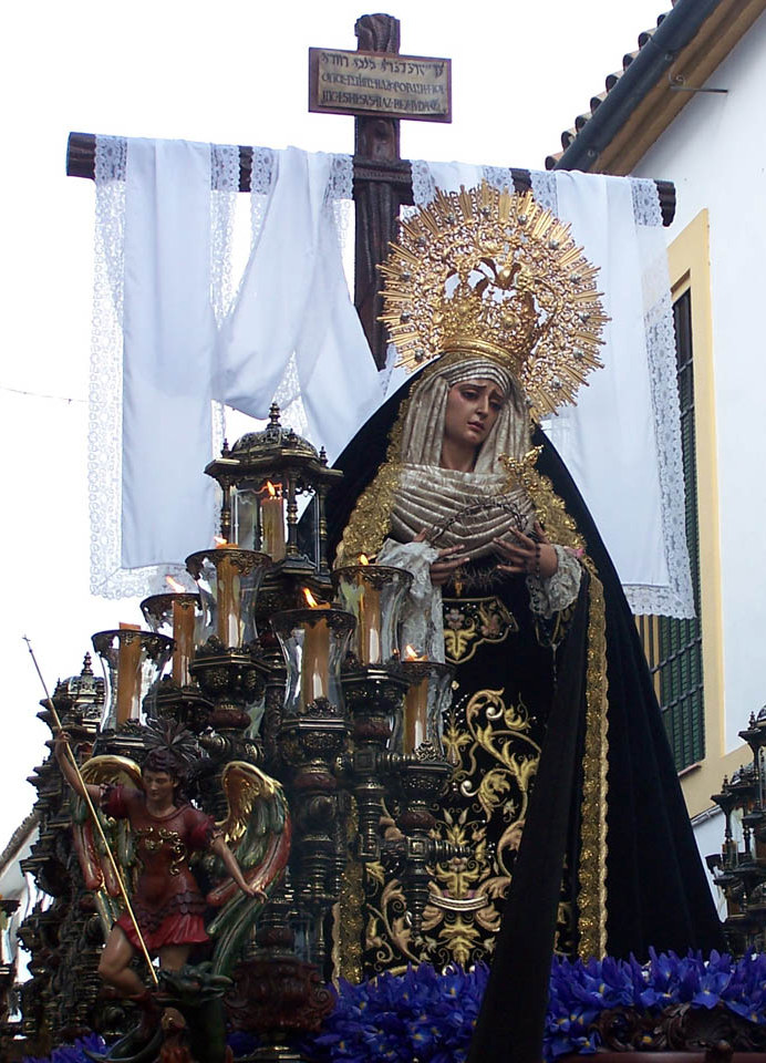 María Santísima de la Soledad